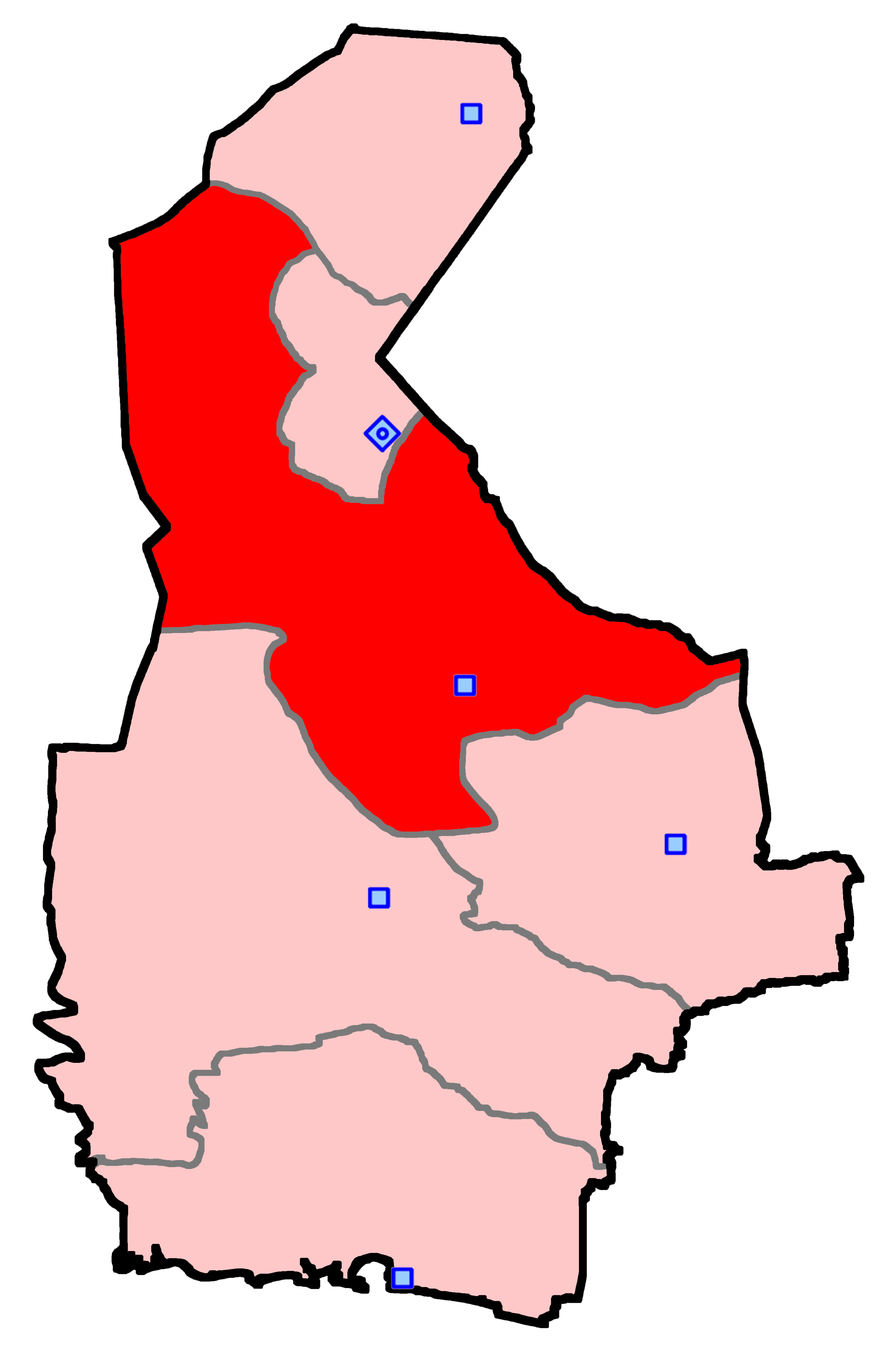 حوزه‌ خاش برای انتخابات مجلس شورای اسلامی